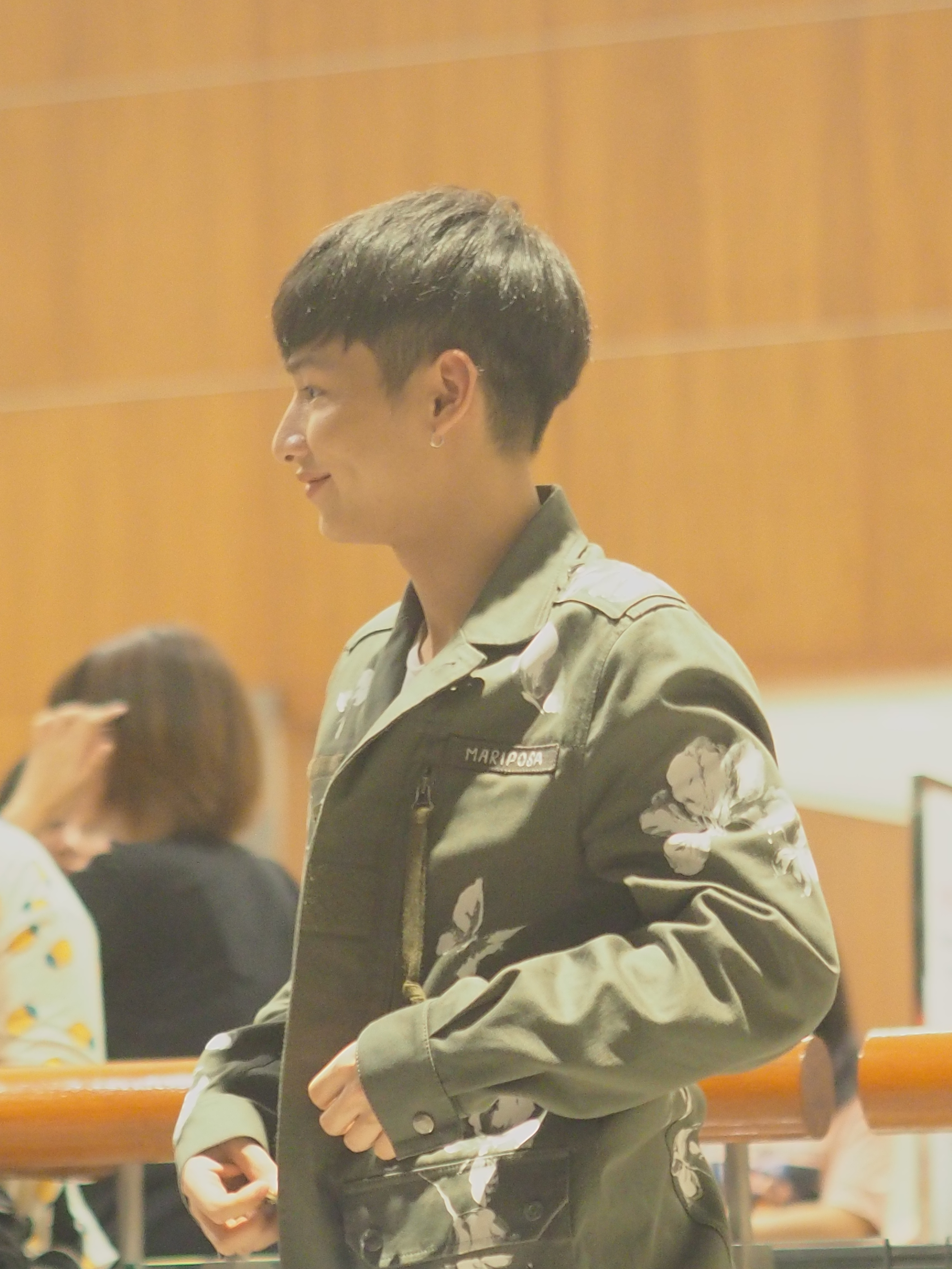 gun attaphan